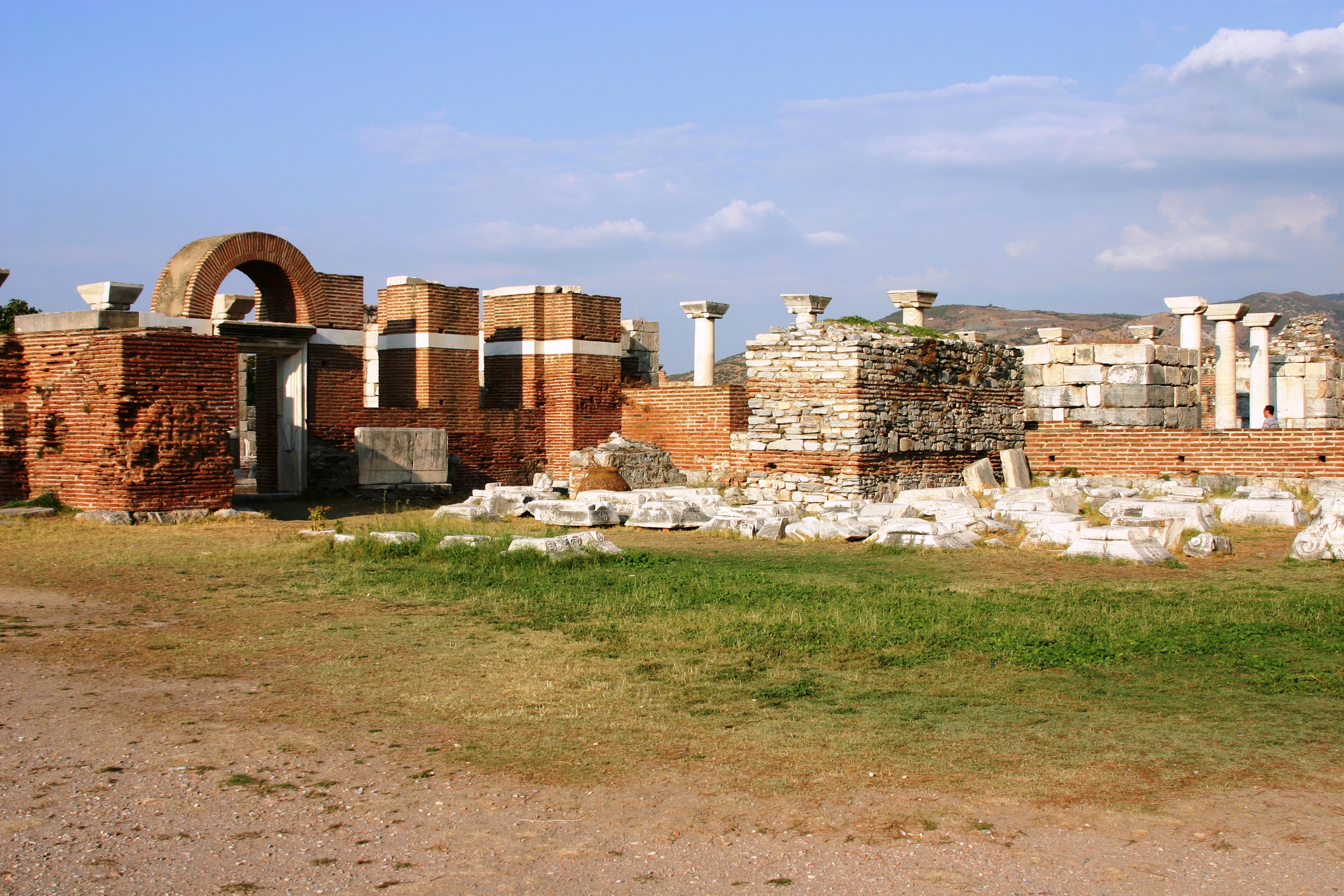 Igreja de São João, em Éfeso